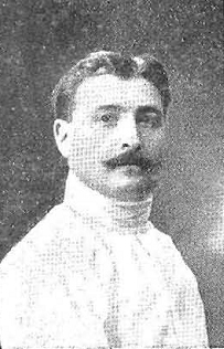 Retrato del tirador Afrodisio Aparicio, fotografía de Christian Franzen recogida en la revista española Nuevo Mundo.